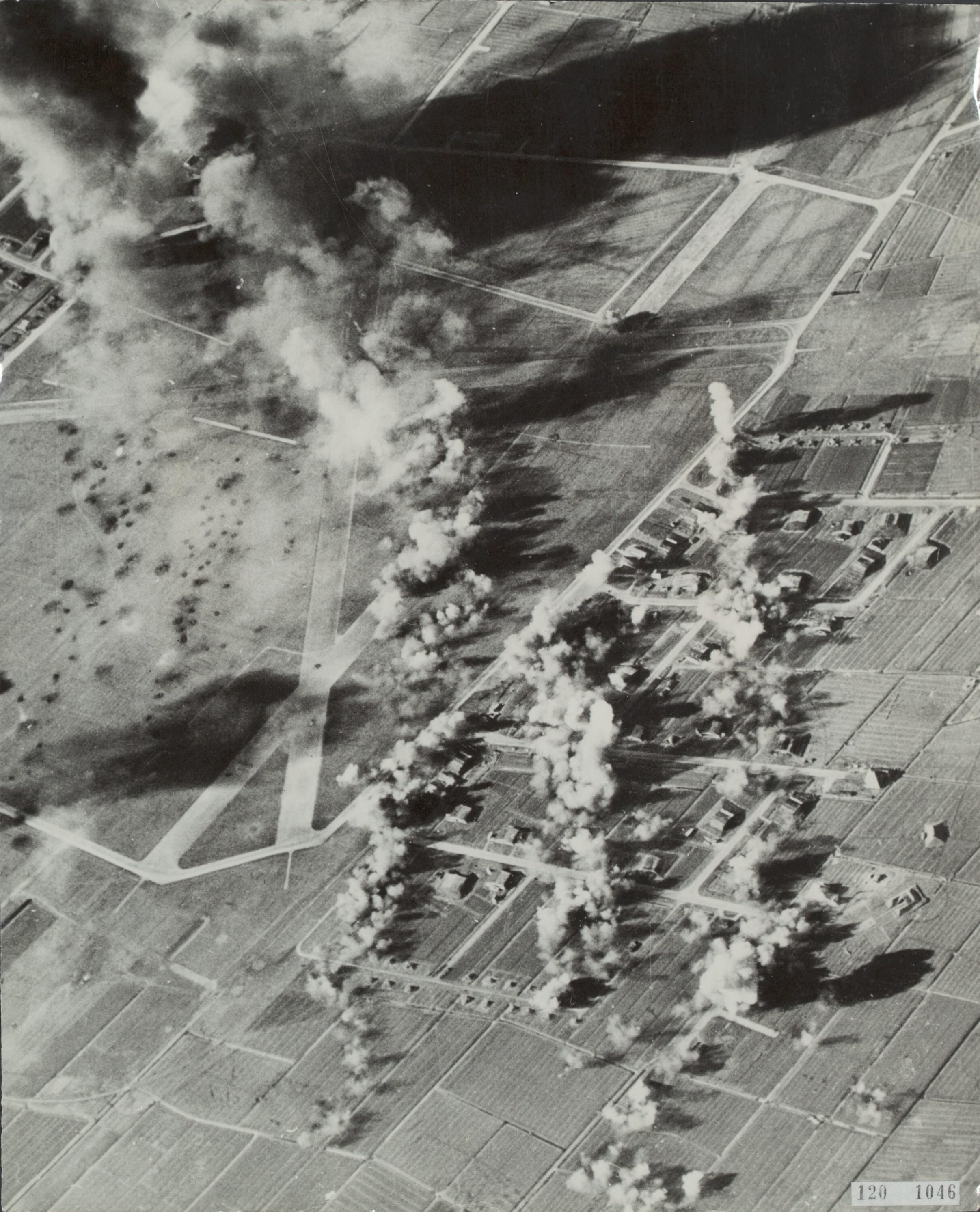 Luchtopname. Bombardement op vliegveld Leeuwarden door B-26 Marauder bommenwerpers van de 9th US Air Force. Een grote concentratie bommen komt tot ontploffing in een sector waar veel vliegtuigshelters zijn.